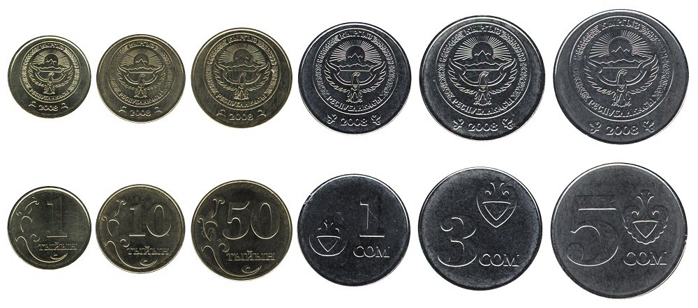 Som kirguís